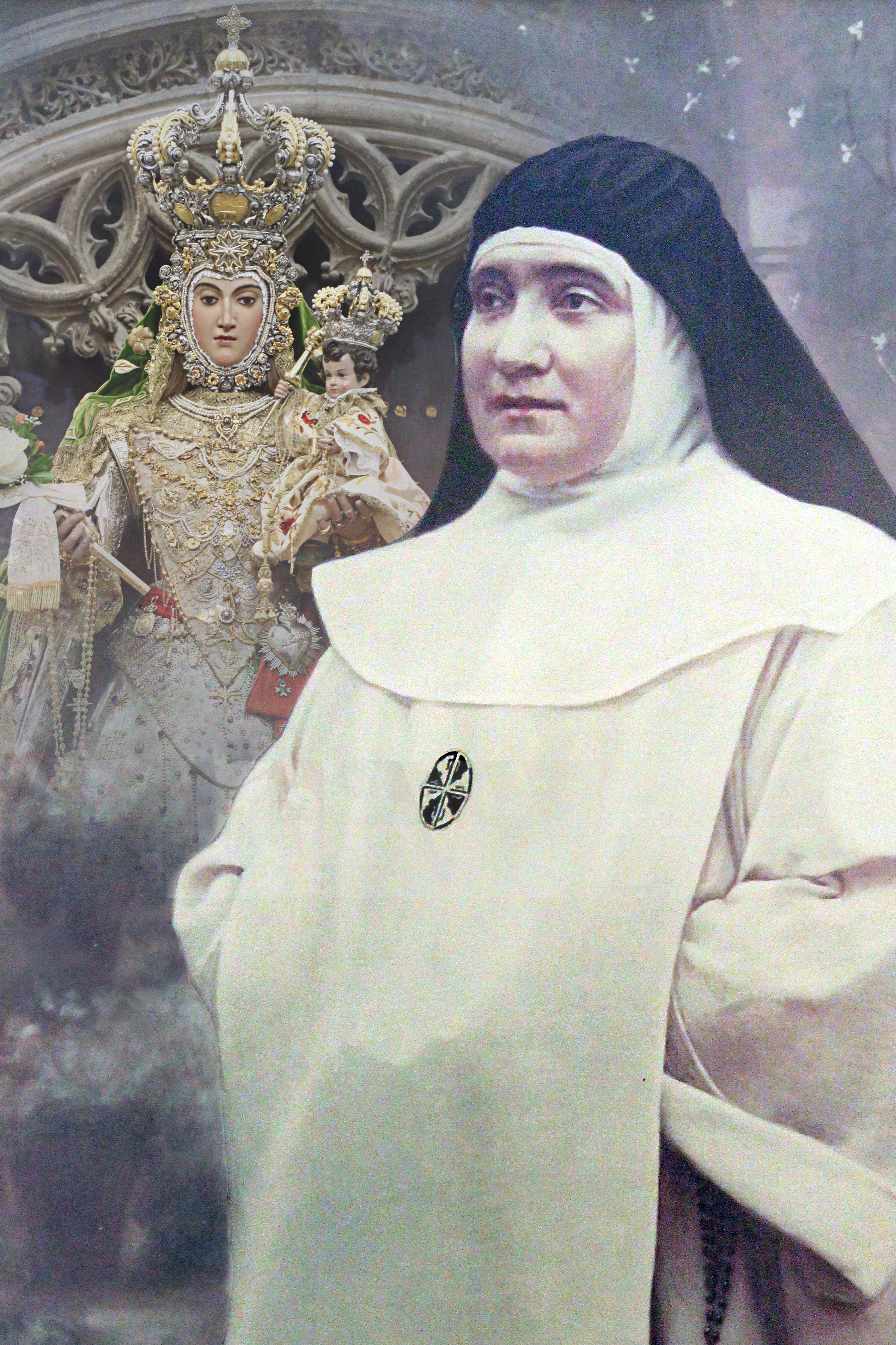 La Madre Teresa Titos Garzón, fundadora de la Congregación de Santo Domingo, junto a la Virgen del Rosario de Granada